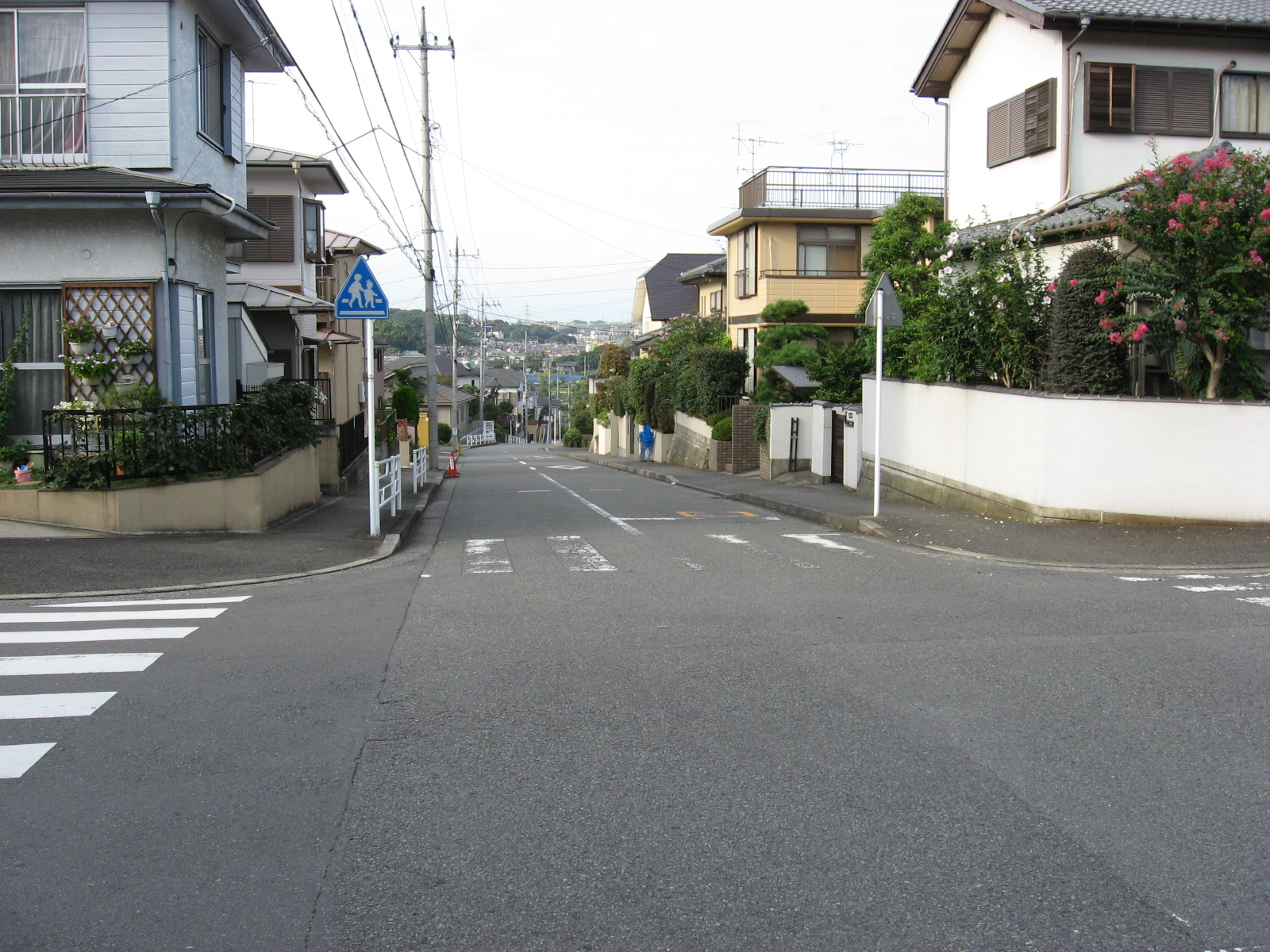 柿の木台バス停付近